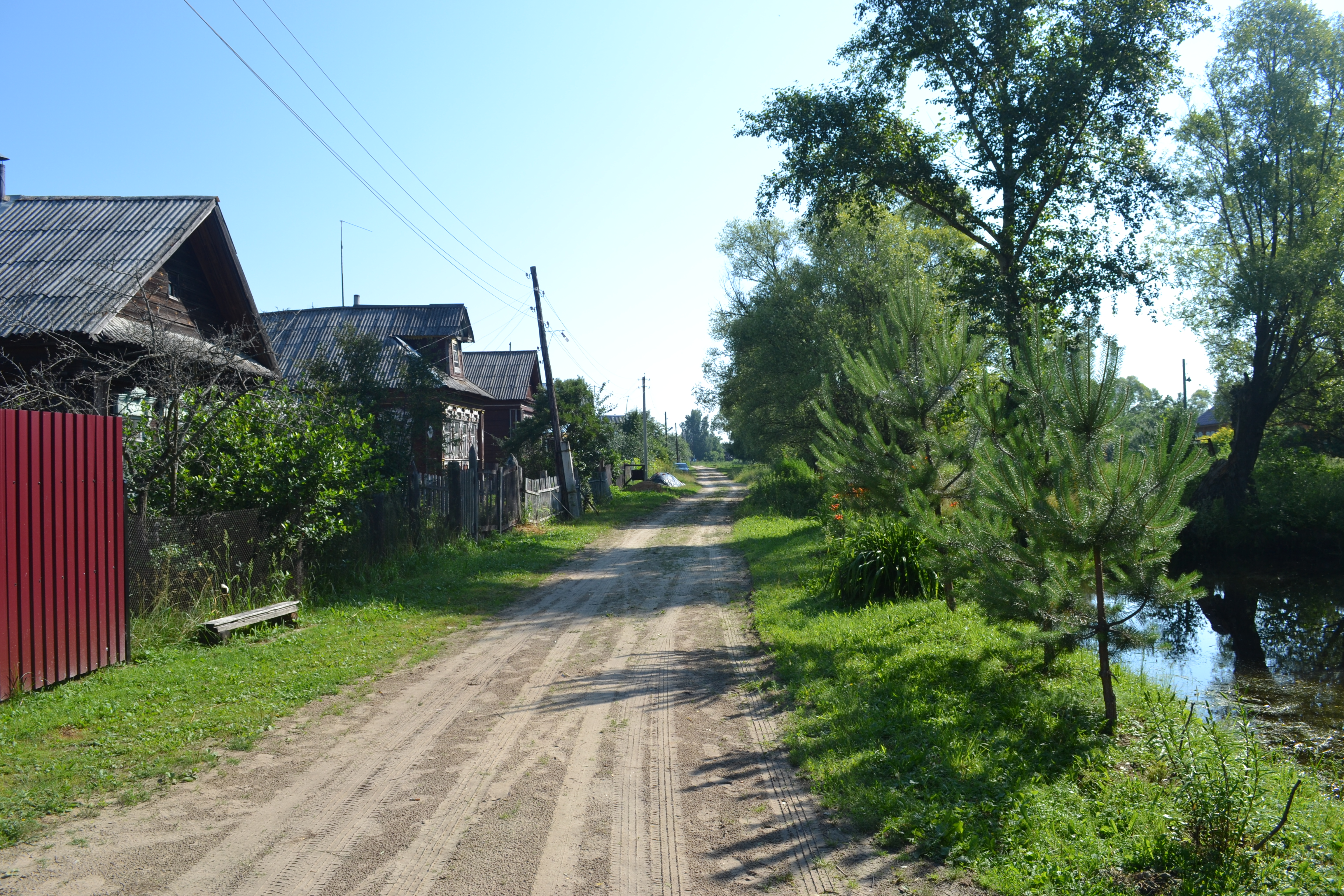 Воропино